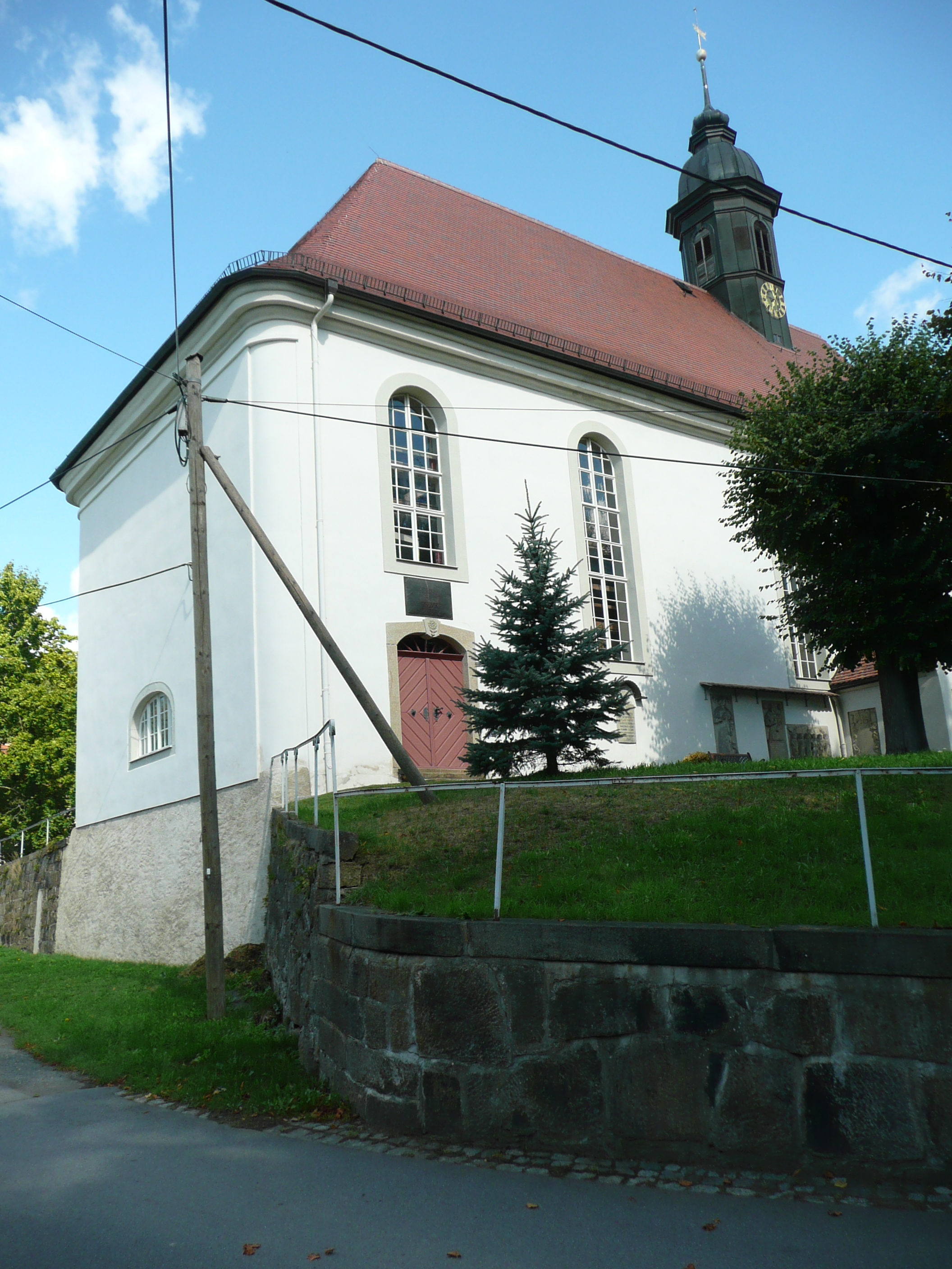 Kirche in Obertaubenheim